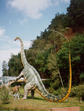 Dinosaurier-Modell auf dem Landesgartenschaugelände in Kaiserslautern